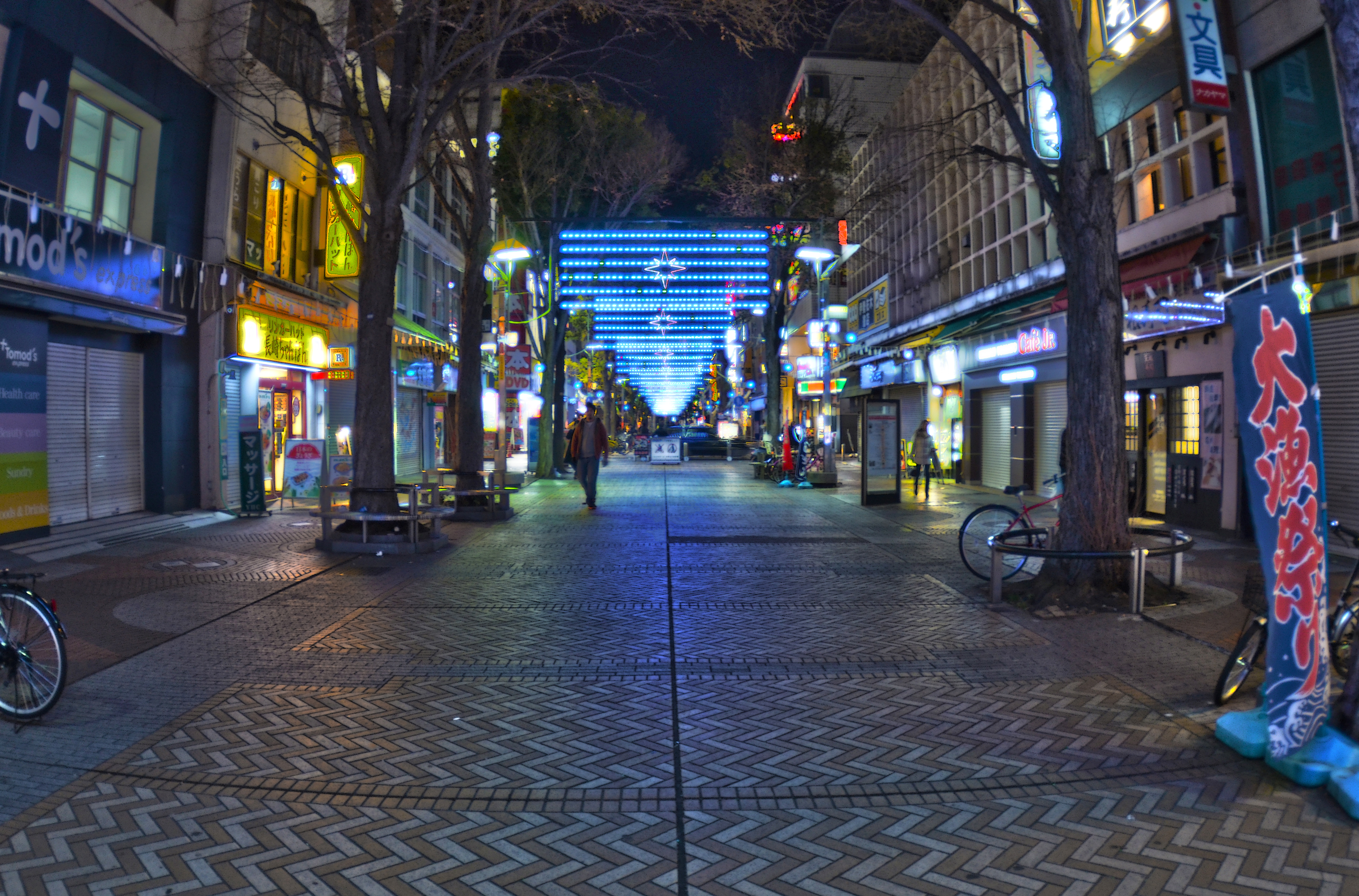 伊勢佐木町2014年1月２日(木)